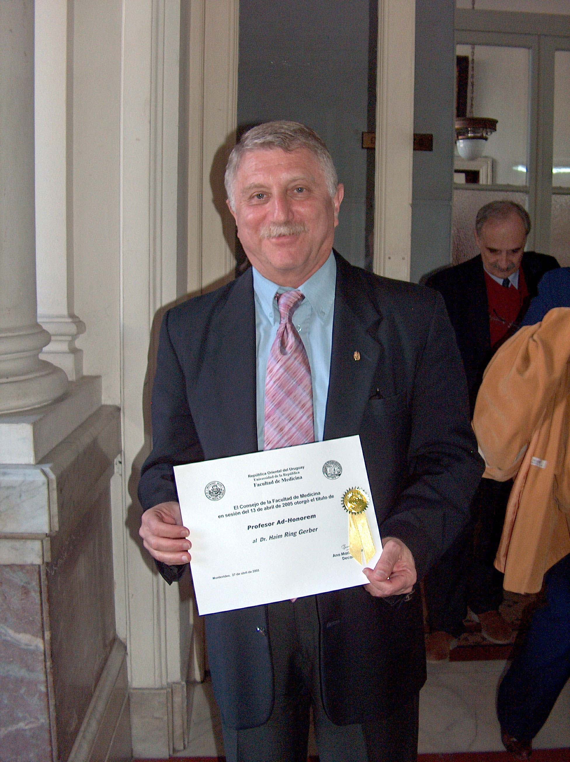 פרופ' חיים רינג בעת קבלת תואר פרופ' לשם כבוד מהפקולטה לרפואה במונטווידאו באורוגוואי בשנת 2005